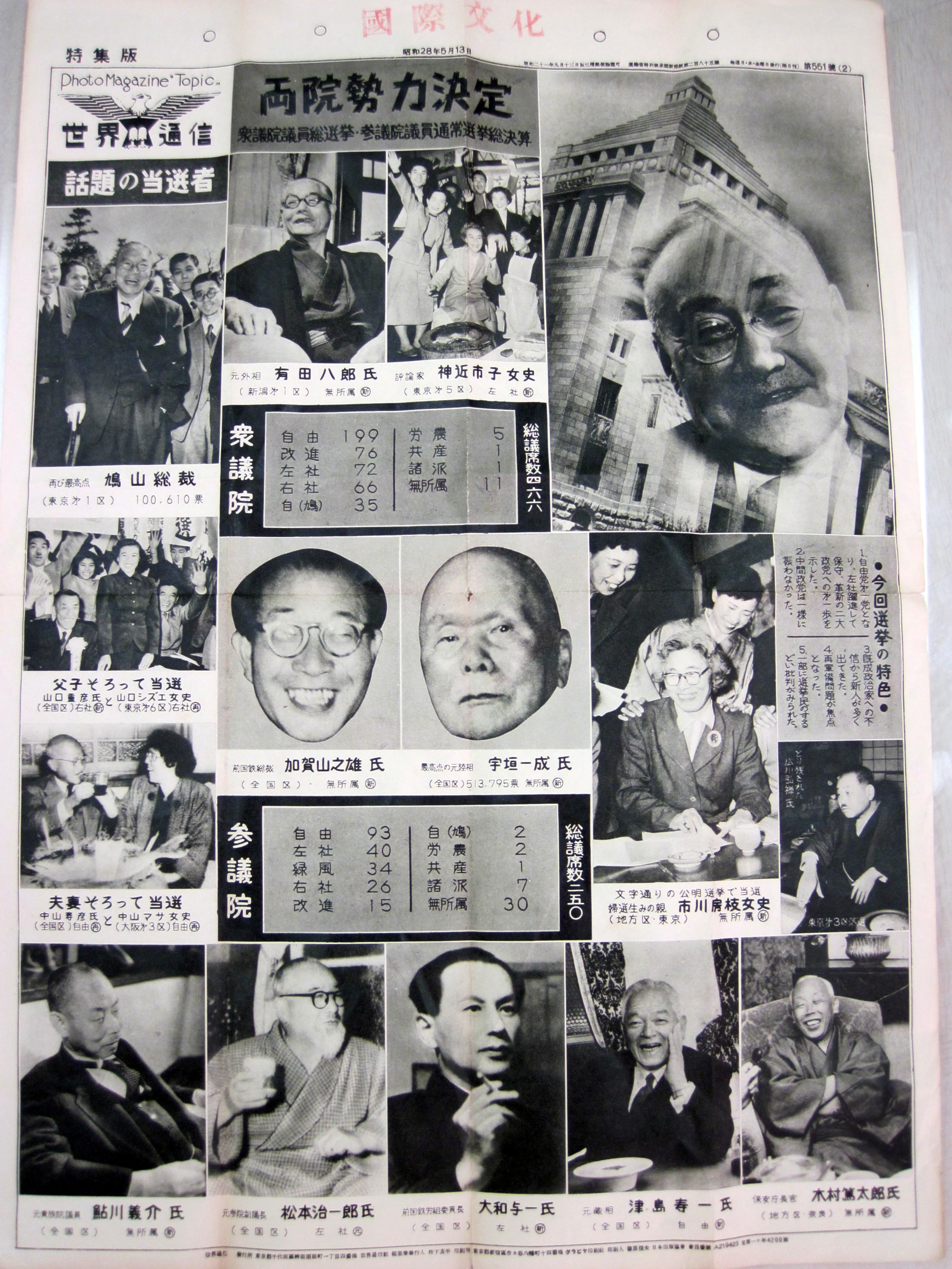 世界通信選挙結果